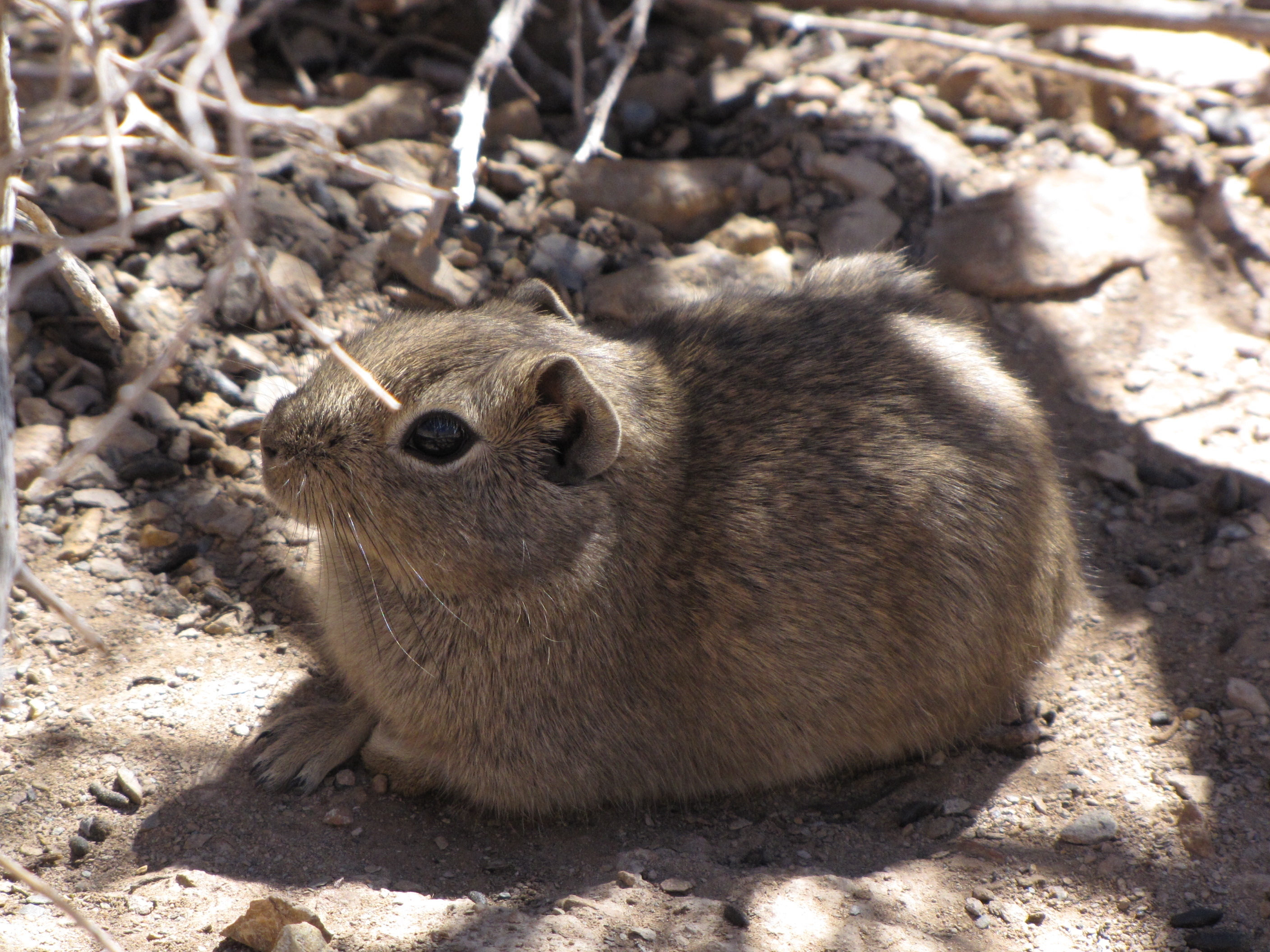 Microcavia australis, Cuis, Cuy o Cuyi de la Provincia de San Juan, Argentina.